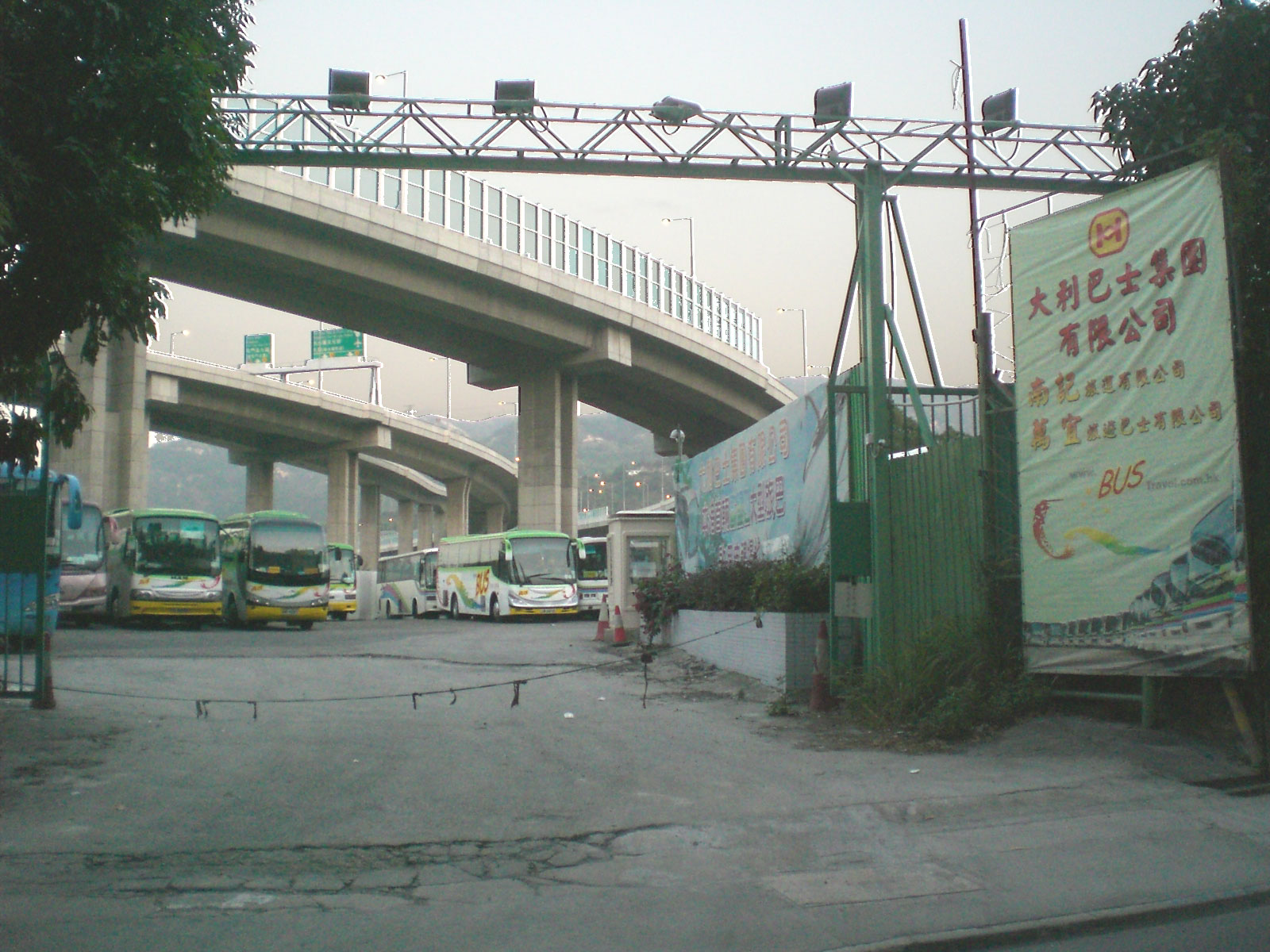 藍地大利巴士集團停車場